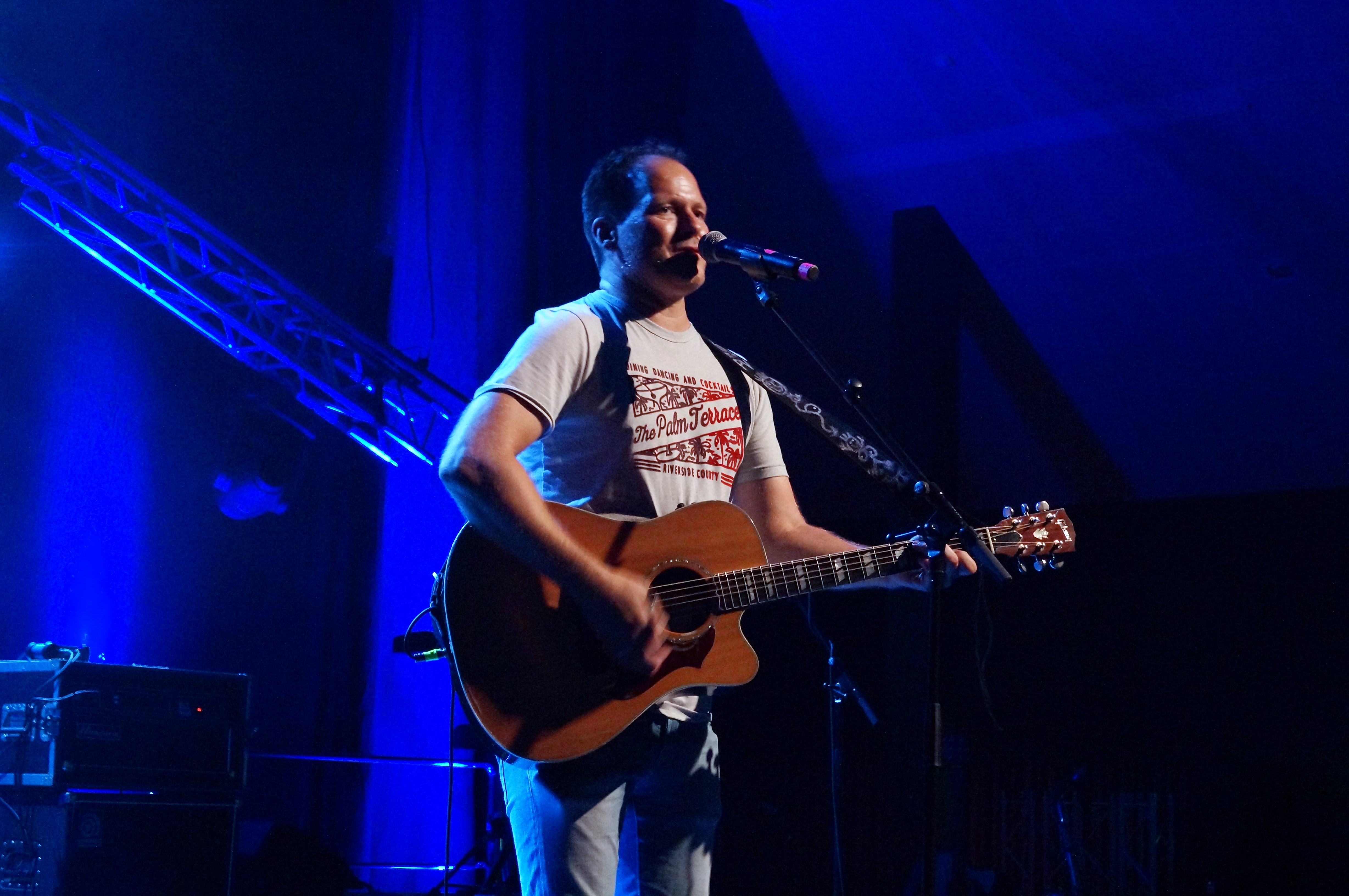 PV Staff underholder på Panorama Hotell & Resort